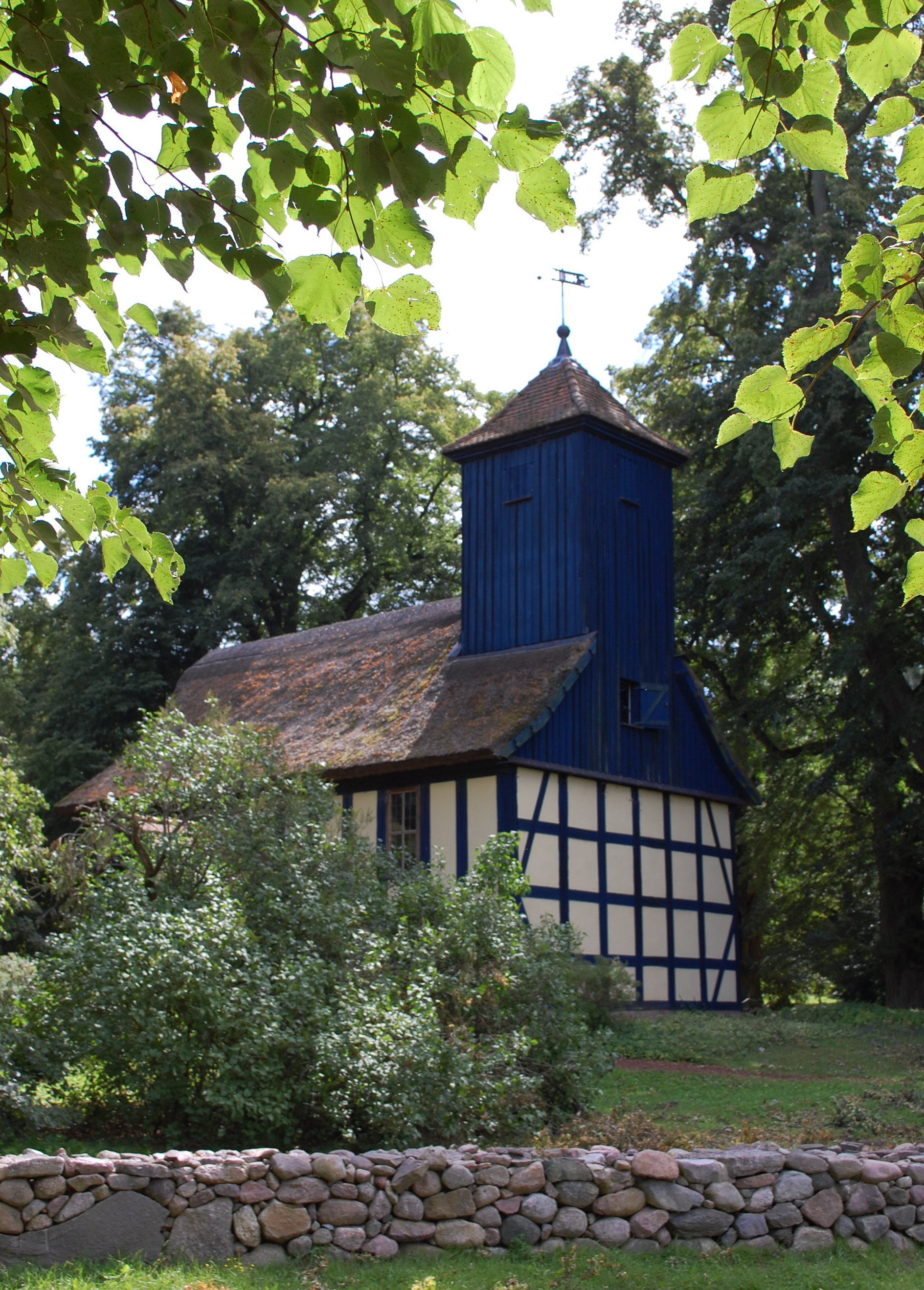 Turm des Kirchleins im Grünen